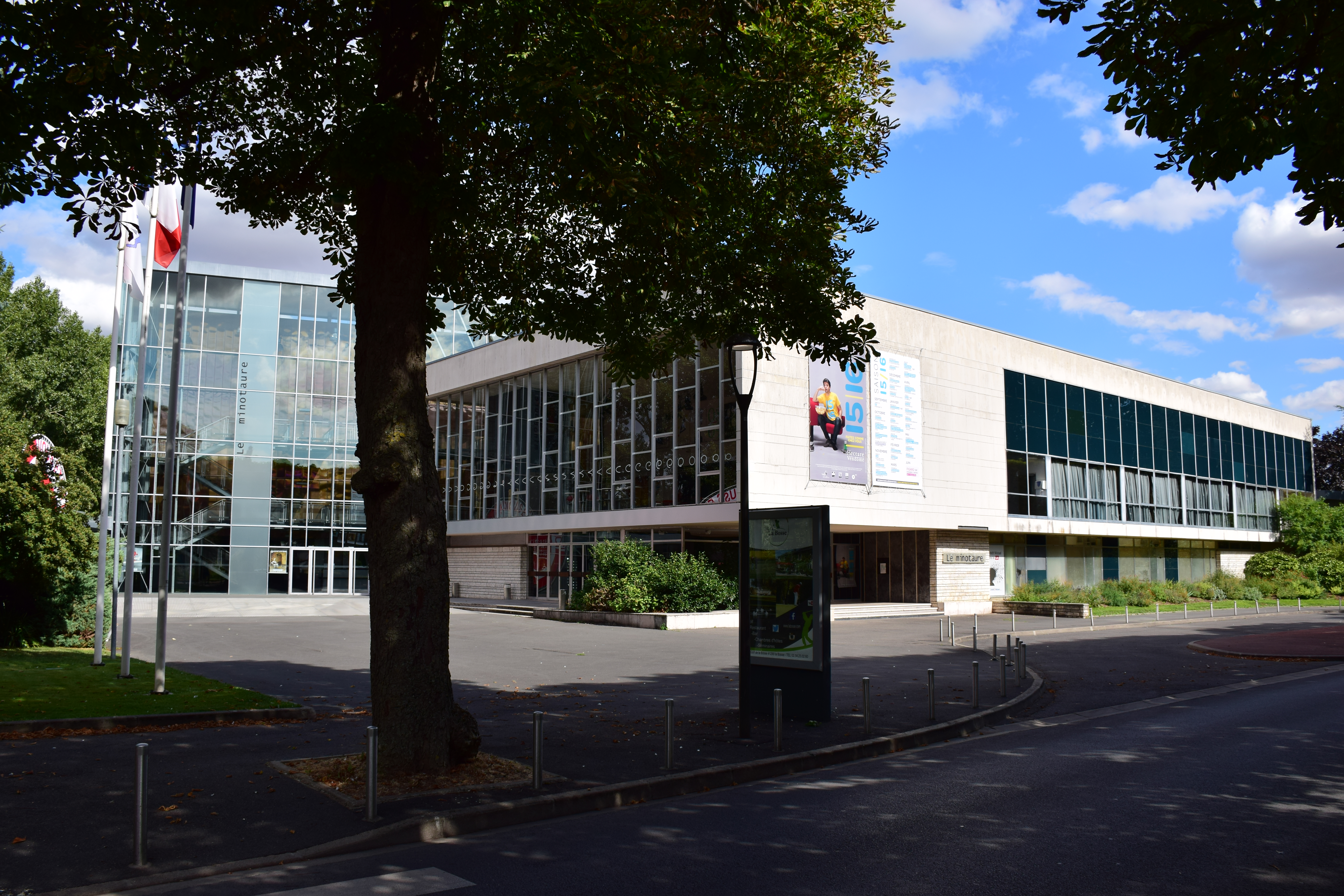 Salle Le Minotaure, à Vendôme, rue César-de-Vendôme.